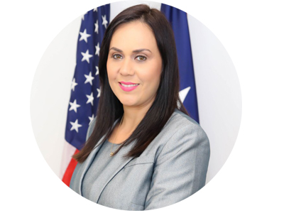 Ivelisse Torres Rivera